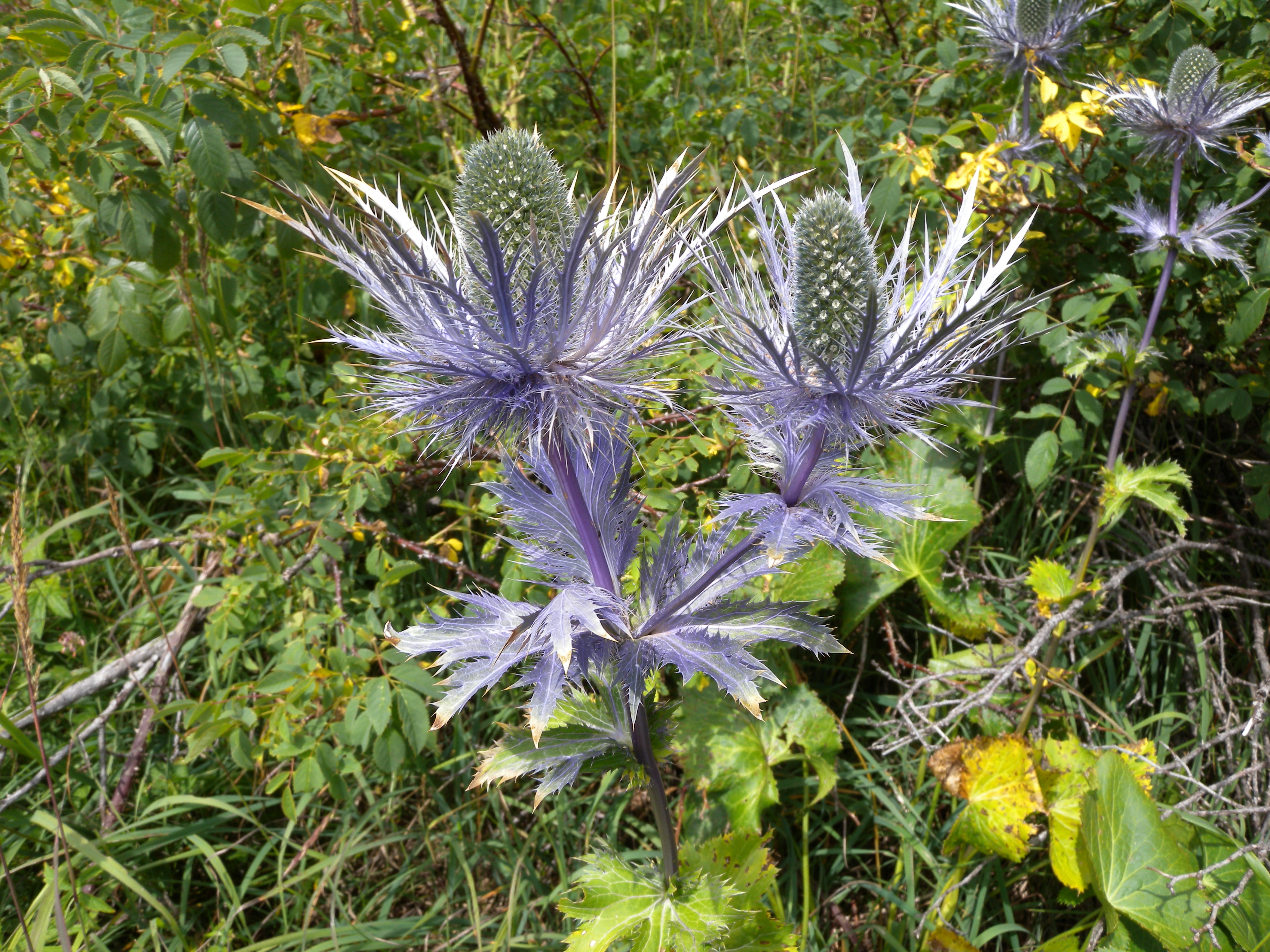 Chardon Bleu Eryngium alpinum